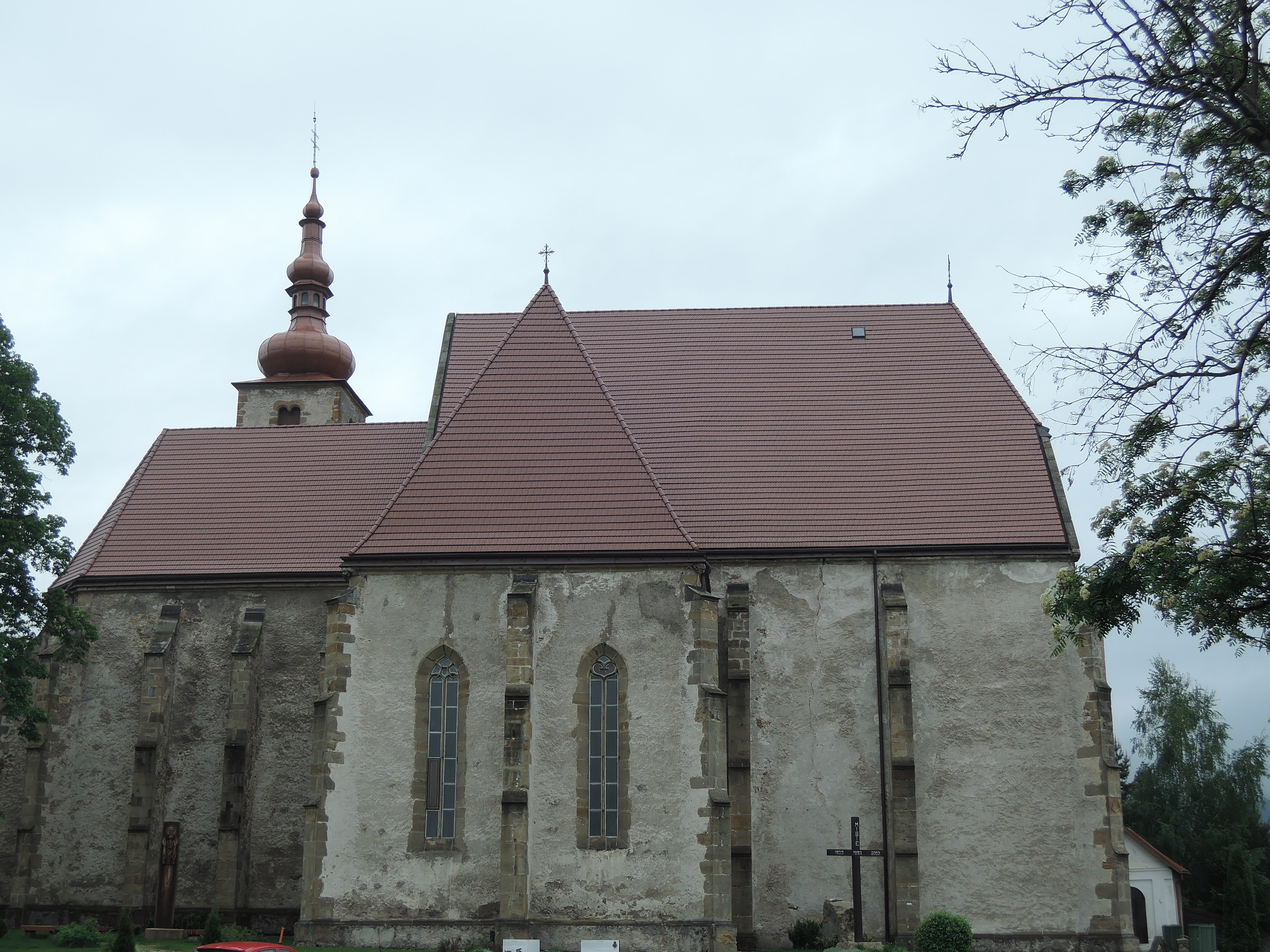 kostol z alkantary